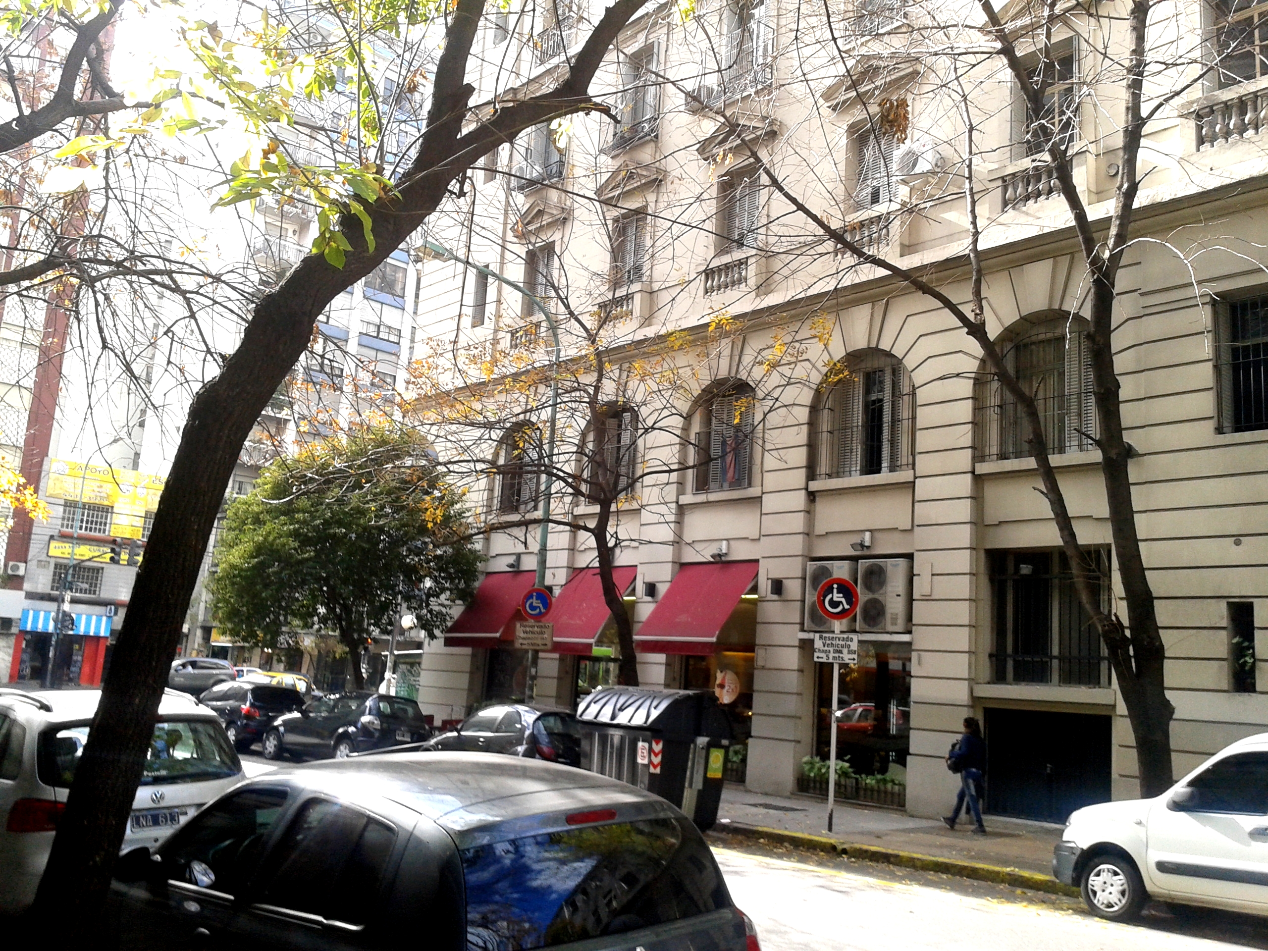 Edificio Femenil visto desde la calle Puán. Barrio de Caballito, Buenos Aires.